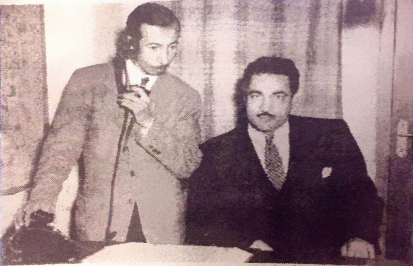 صورة تجمع بين الفنان نوري الراوي والشاعر الكبير بدر شاكر السياب في مديرة المستوردات وزارة التجارة عام